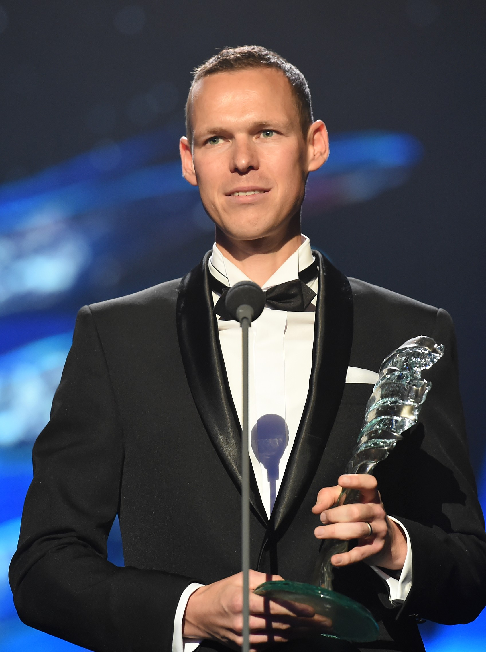 Matej Tóth, Krištálové krídlo 2015.